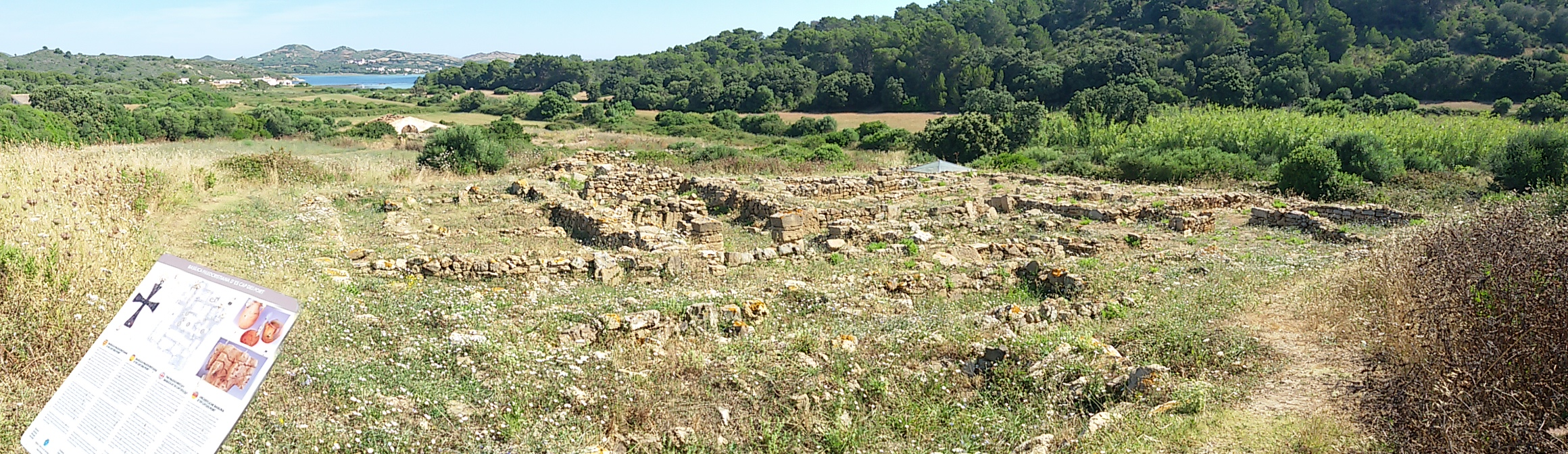 Basílica de la cabecera del Puerto de Fornells, Es Mercadal, Menorca, Islas Baleares, España